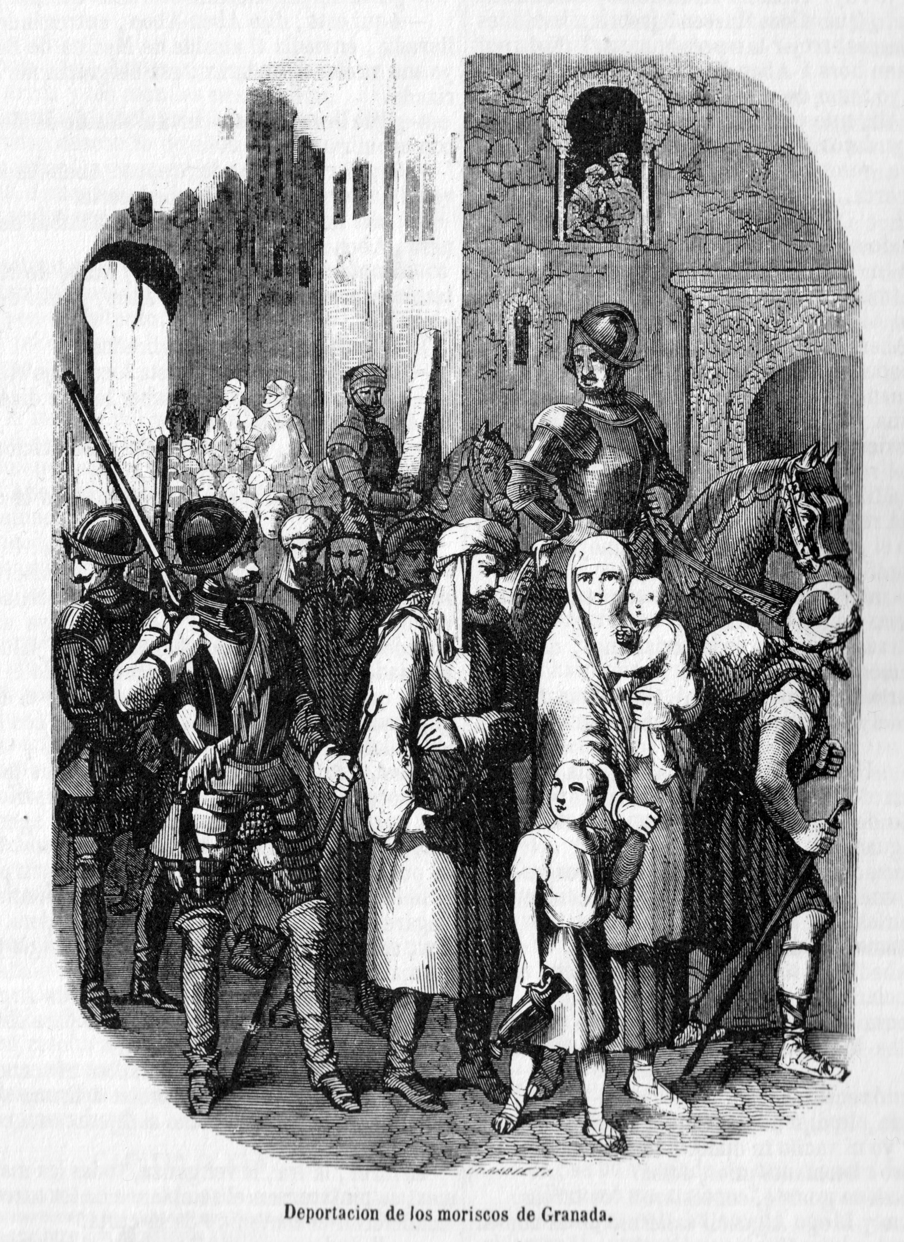 Deportacion de los moriscos de Granada